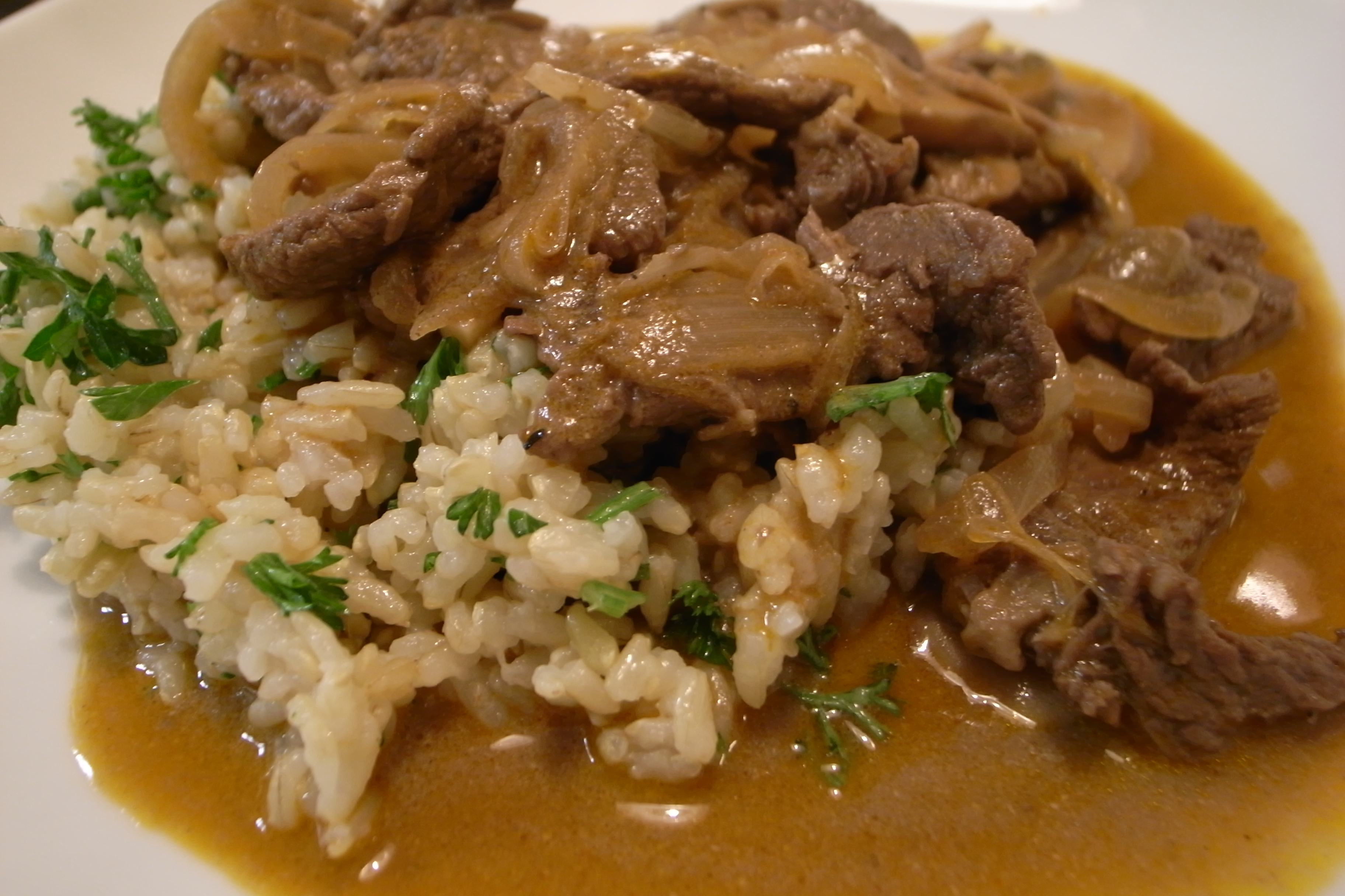 Бефстроганов